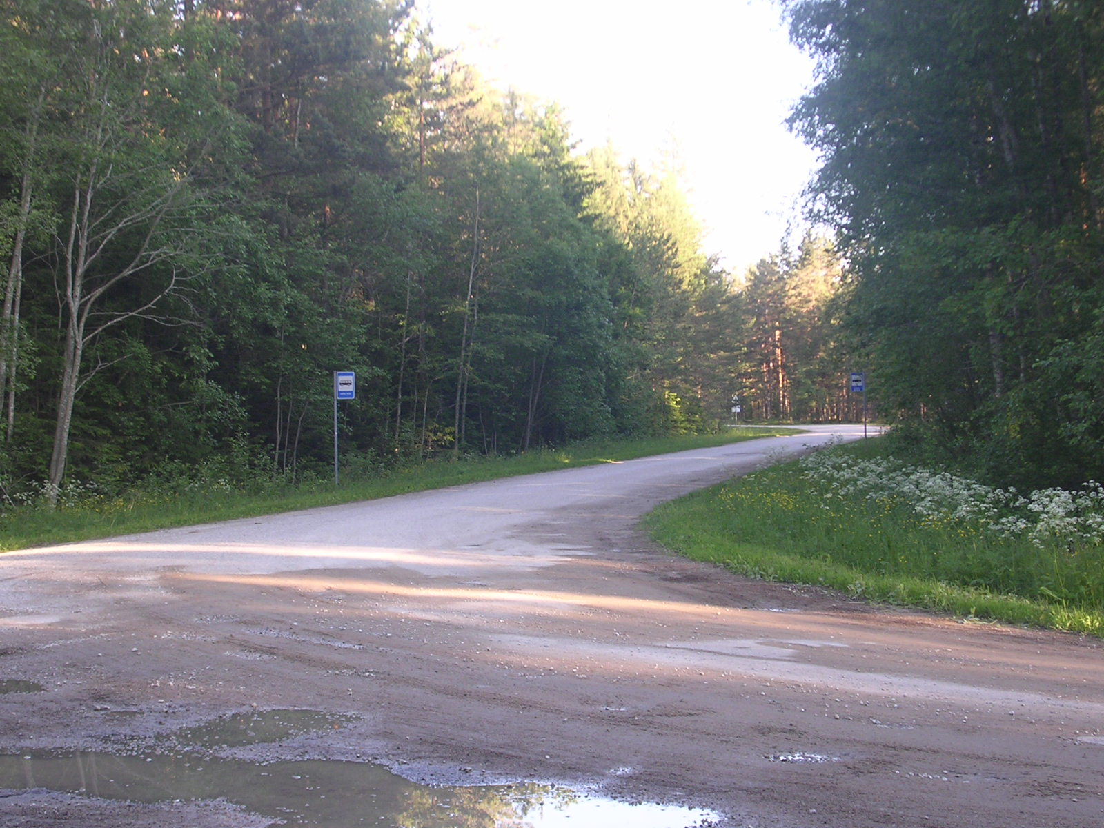 Bussipeatus Virve külas.